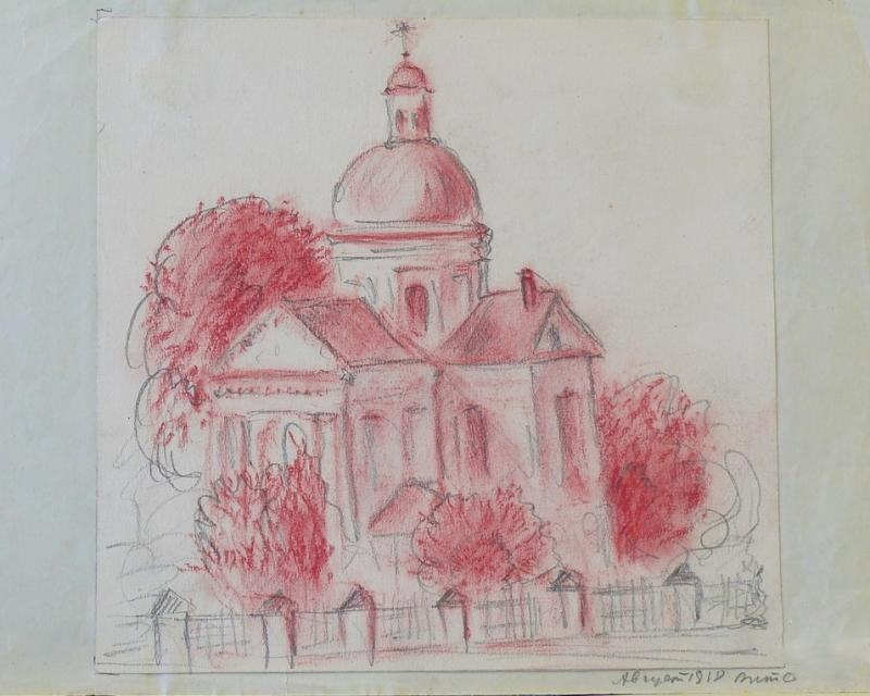 Беларуская (тарашкевіца): Віцебск (Viciebsk), вуліца Спаская (vulica Spaskaja). Царква Сьвятога Спаса